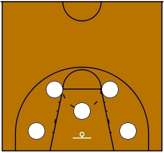 Basketball Zone Defense